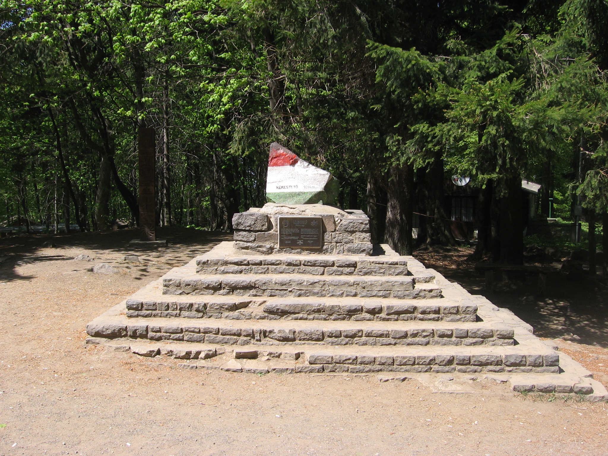 Mount Kékes peak - the highest point of contemporary Hungary Kamień na szczycie Kékes - najwyższy punkt dzisiejszych Węgier